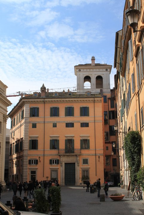 Calle de Roma - Italia